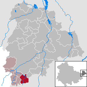 Thonhausen in Thuringia - District Altenburger Land